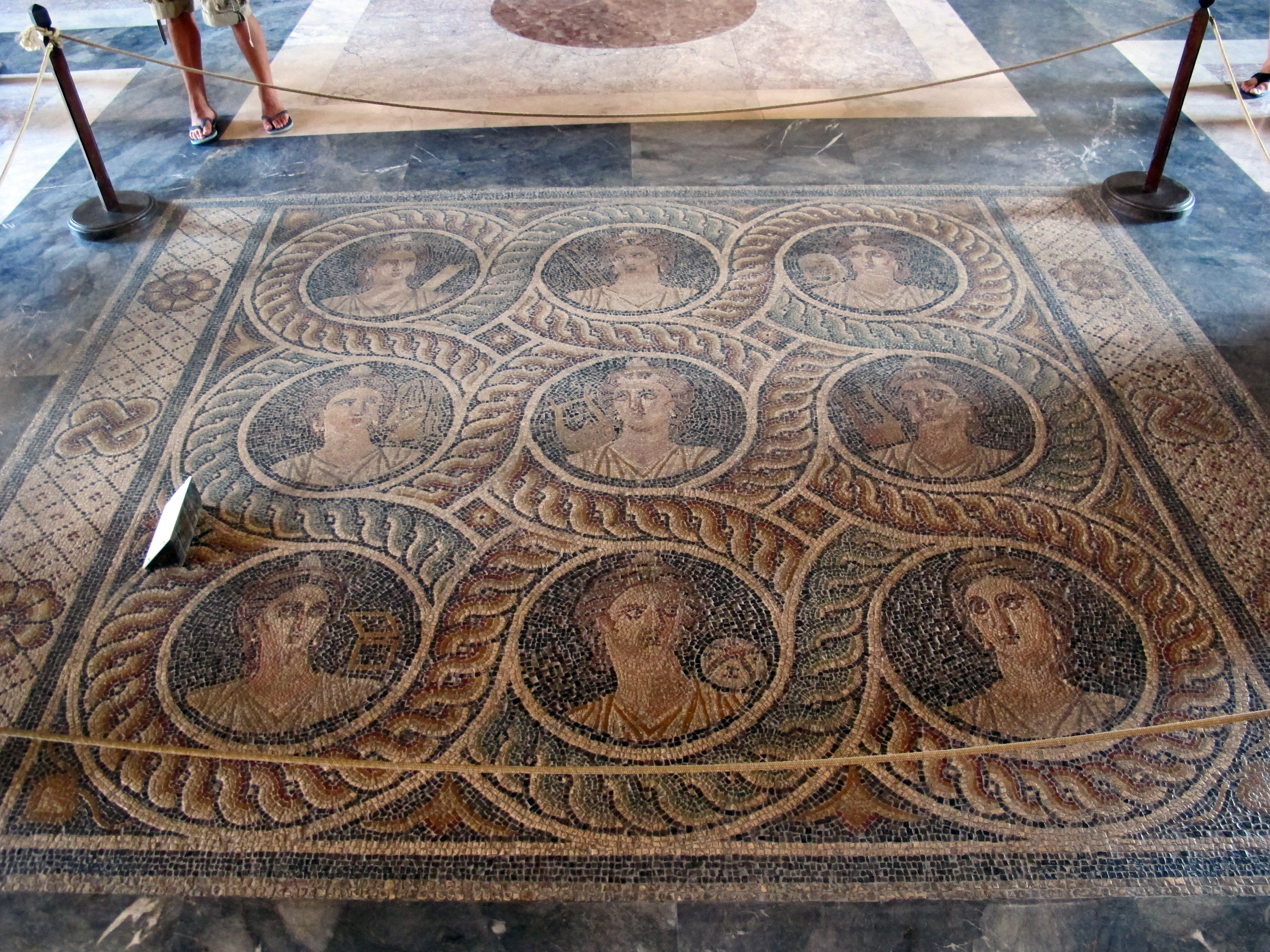 Palazzo dei gran maestri di rodi, sala delle muse, mosaico delle nove muse da kos